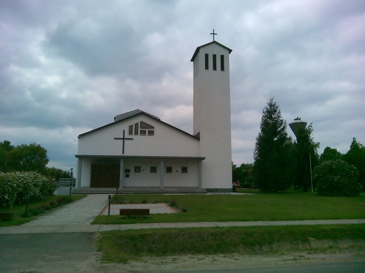 Érsekhalma Római katolikus templom